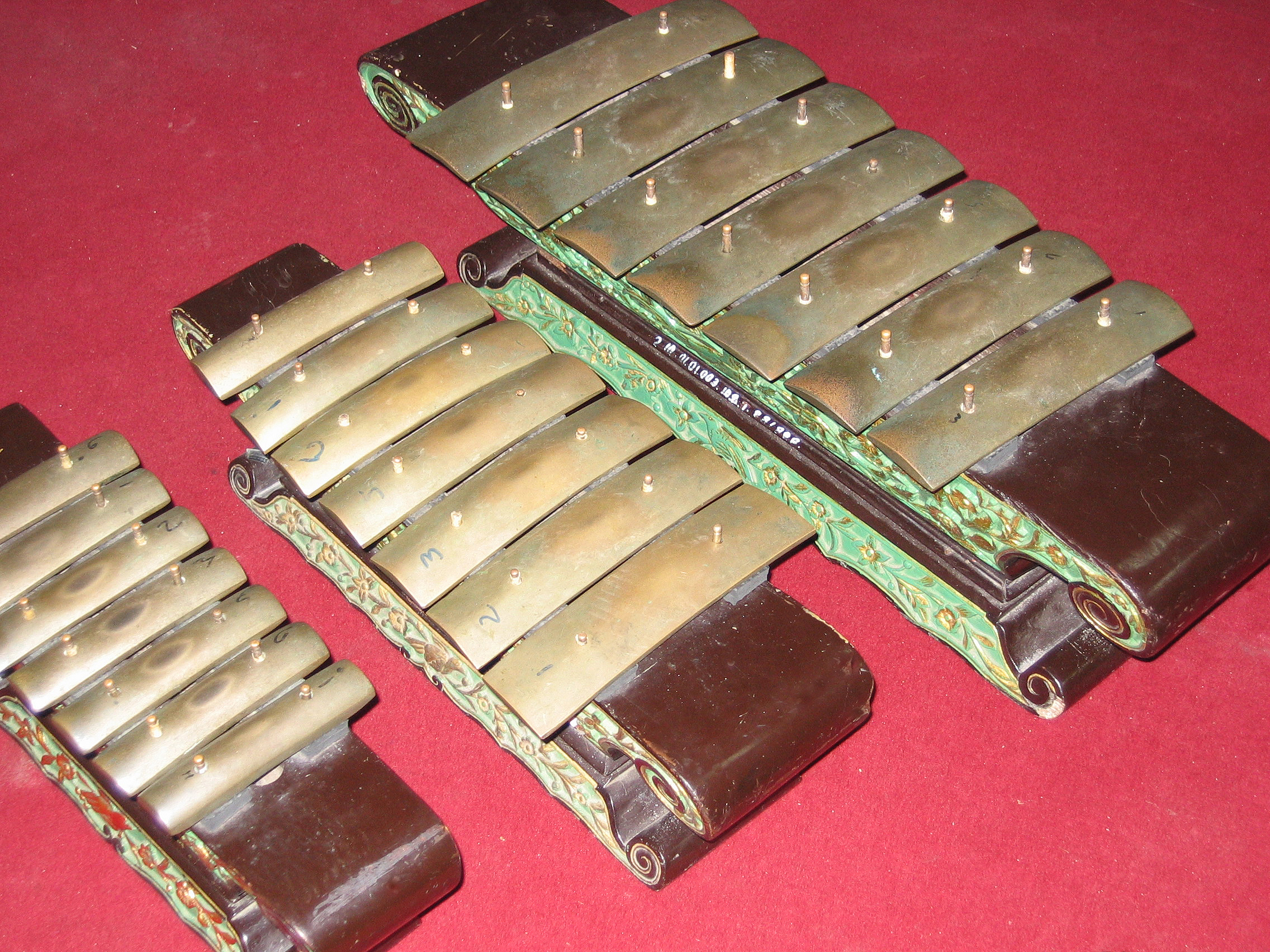 Demung_Saron_Peking,_STSI_Surakarta.jpg own work 2001 Giovanni Sciarrino